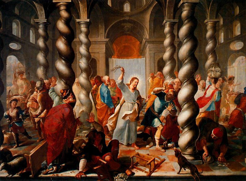 La obra representa a Jesucristo encolerizado y expulsando a los mercaderes del Templo de Jerusalén.